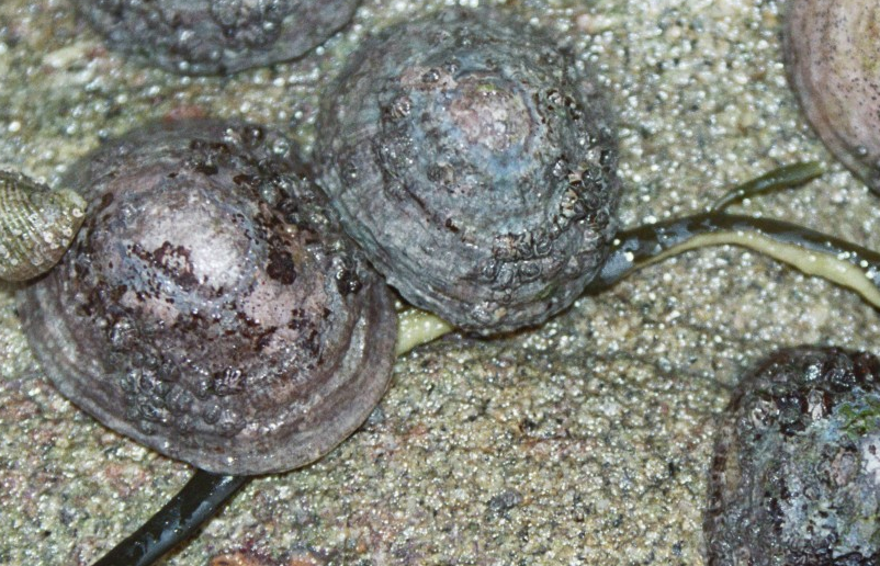 Patelles consommant un rameau d'ascophylle.